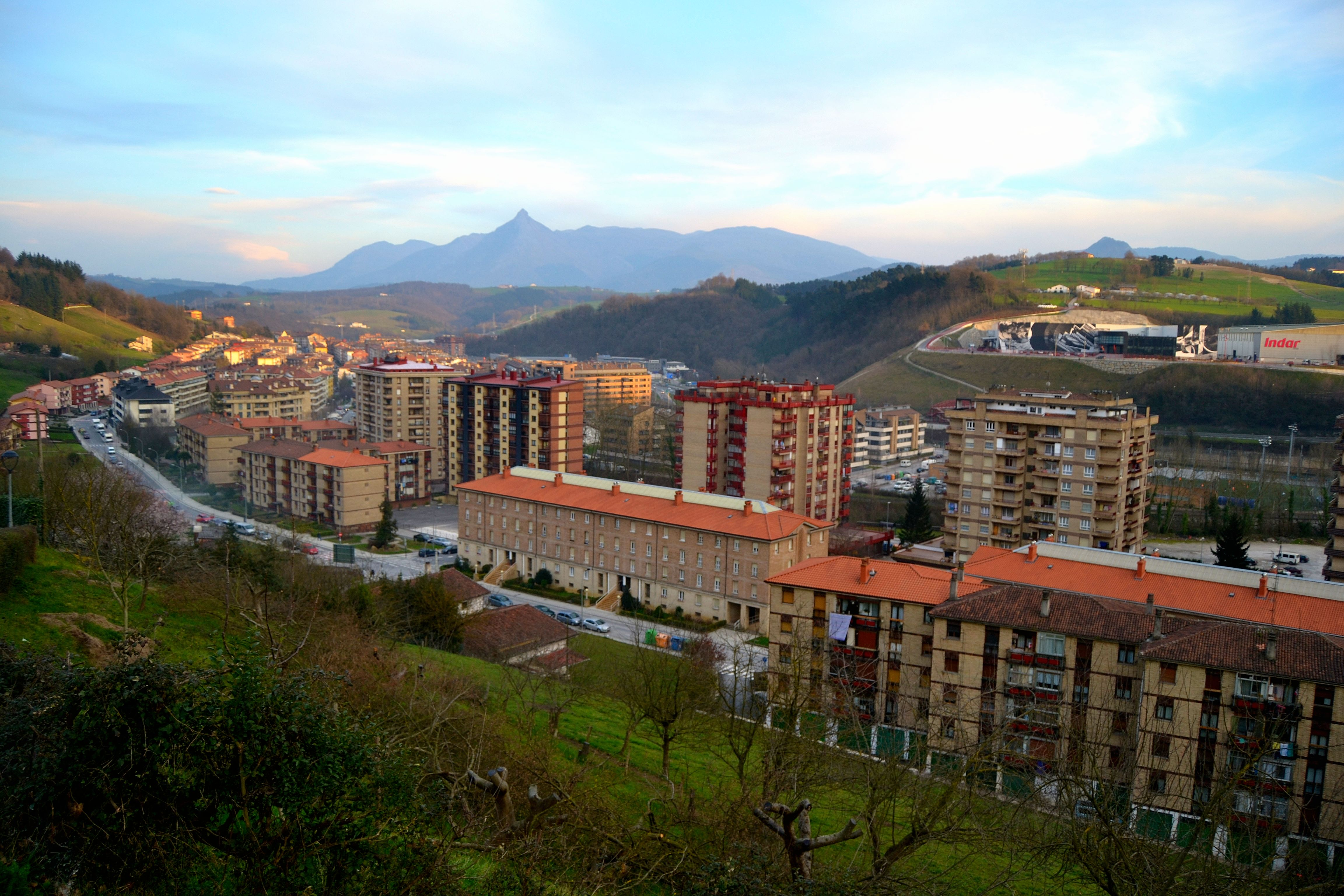 Beasain. Gipuzkoa, Euskal Herria. Beasain. Gipuzkoa, Basque Country.